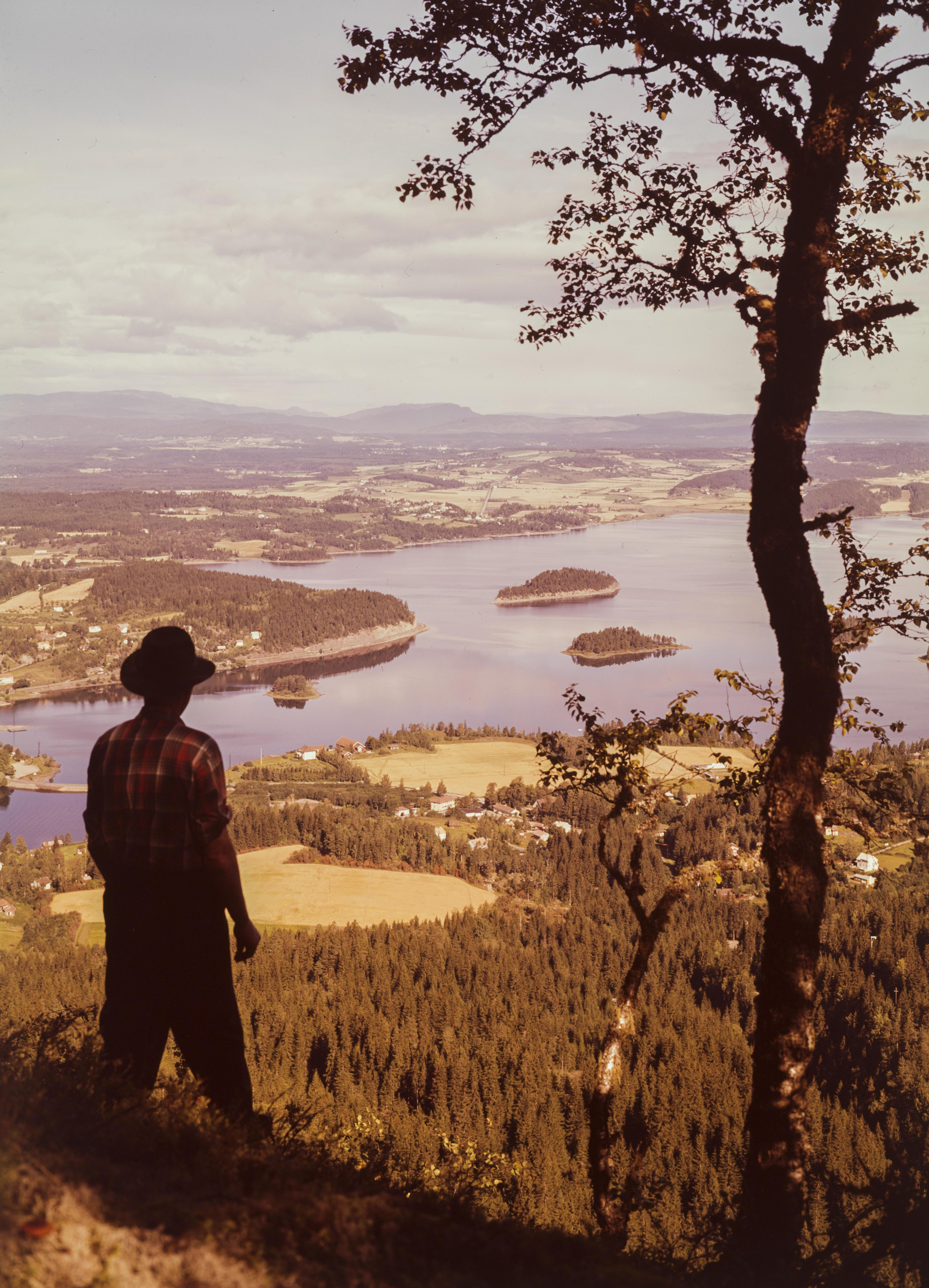 Bildet er hentet fra Nasjonalbibliotekets bildesamling. Anmerkninger til bildet var: Tittel er hentet fra emballasje. Krokkleiva,Tyrifjorden,Steinsfjorden, Hole, Buskerud